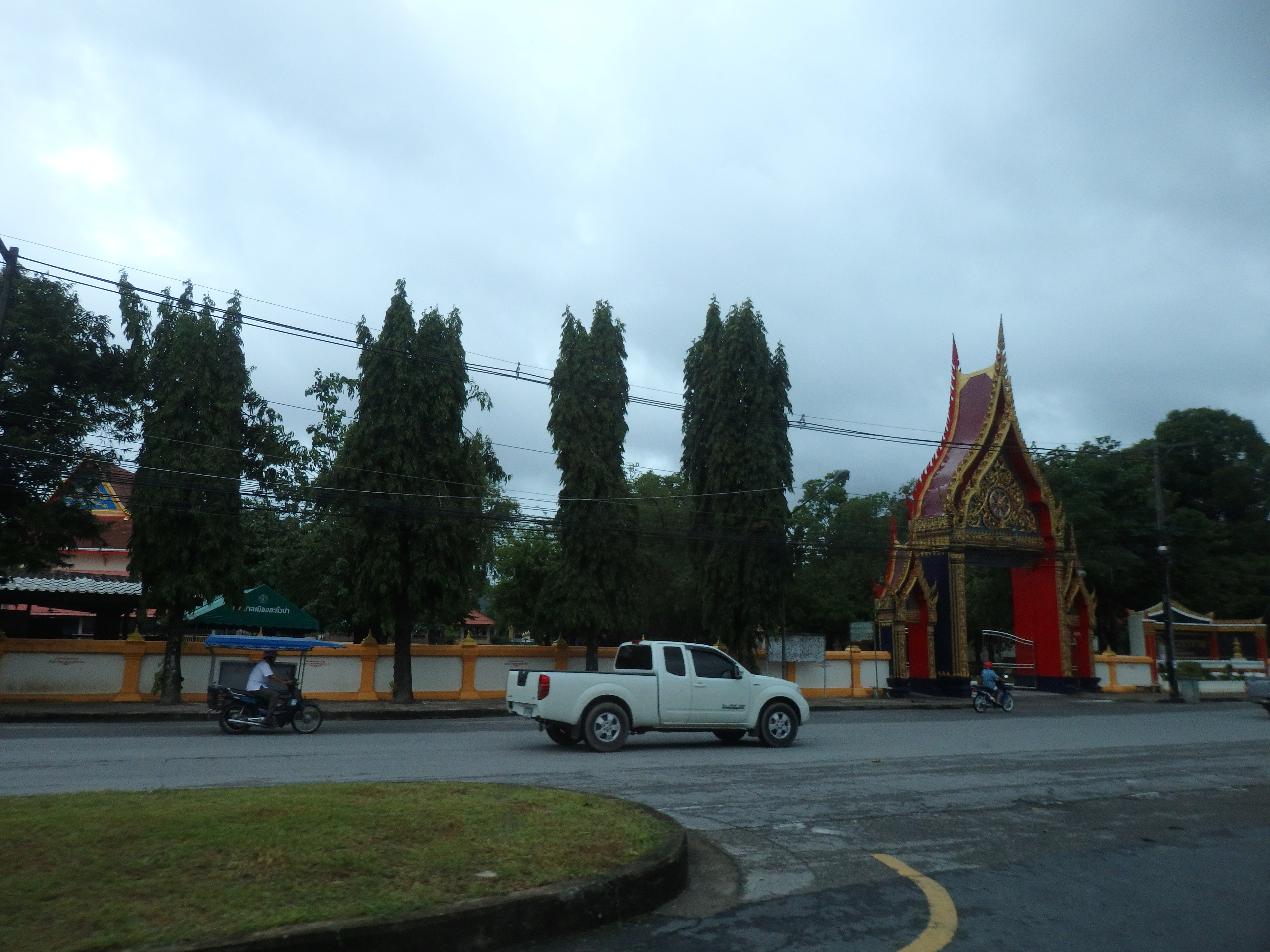 Takua Pa, Takua Pa District, Phang-nga, Thailand